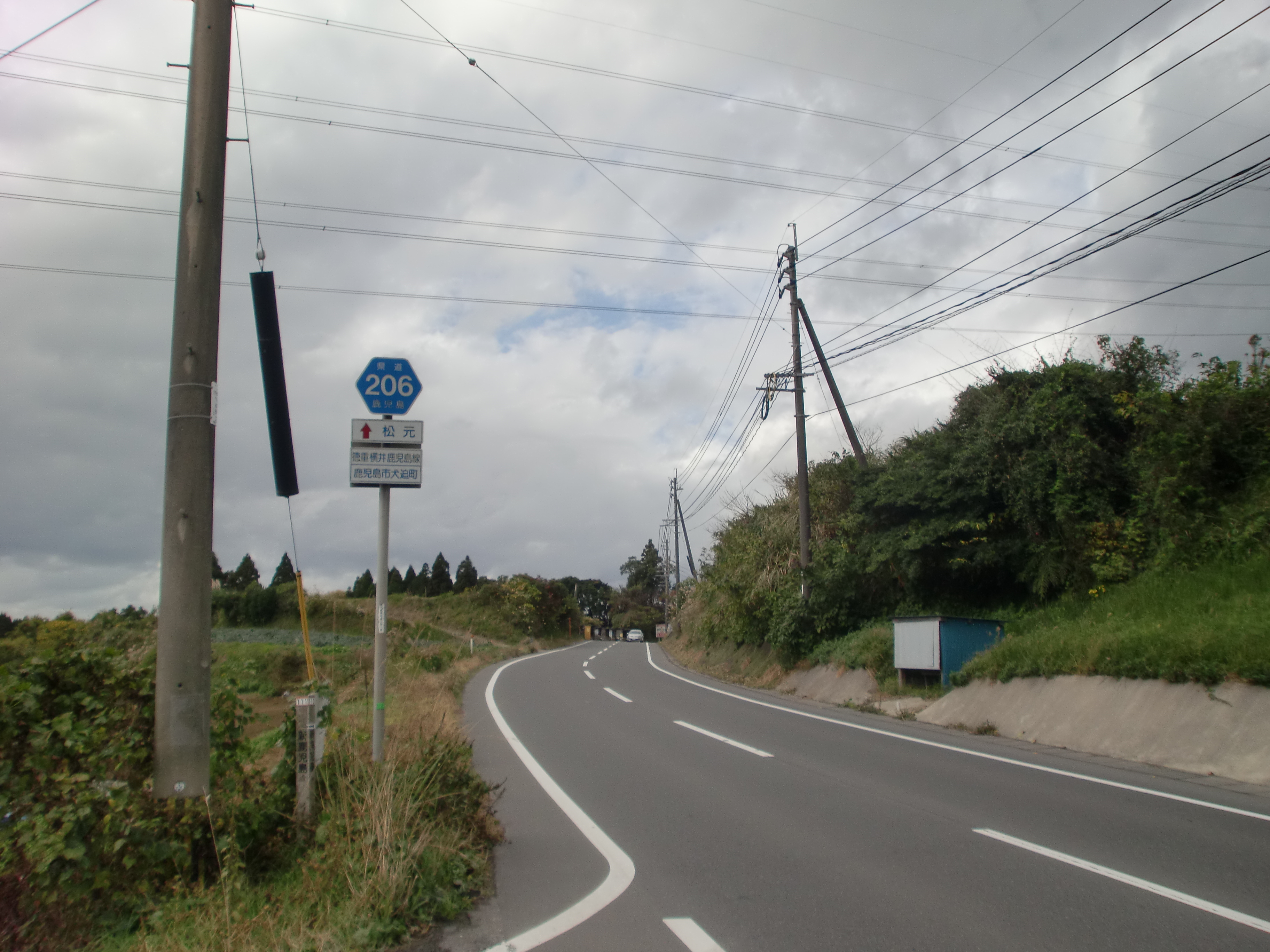 鹿児島県道206号徳重横井鹿児島線を犬迫町付近から伊集院方面を望む。